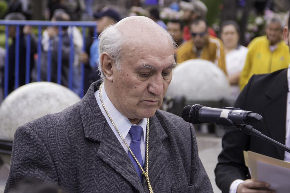 El lunes 12 de septiembre de 2016, a 13:30, en el Museo Antropológico de Arte Contemporáneo (MAAC) en Guayaquil, se despediron los restos del Obispo Cuero y Caicedo con altos honores castrenses. Los restos del Primer Presidente del Estado de Quito llegaron al aeropuerto de Tababela desde donde partió hasta la Plaza Grande. A las 17:00, se inicio el homenaje al prelado con la entrega de una ofrenda floral en el Monumento a los Próceres de la Plaza de la Independencia, posteriormente se celebrará el acto litúrgico en la Catedral Metropolitana, eventos públicos en el que participo Raúl Vallejo, titular de la cartera de Cultura y Patrimonio, Anabela Hermosa, segunda Vicealcaldesa de Quito, , Monseñor Fausto Trávez, Arzobispo de Quito, Jorge Núñez Sánchez, director de la Academia Nacional de Historia del Ecuador.